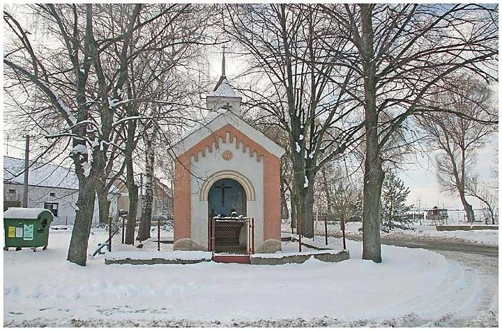 Paple Panny Marie ve vsi Blinka v okrese Kolín